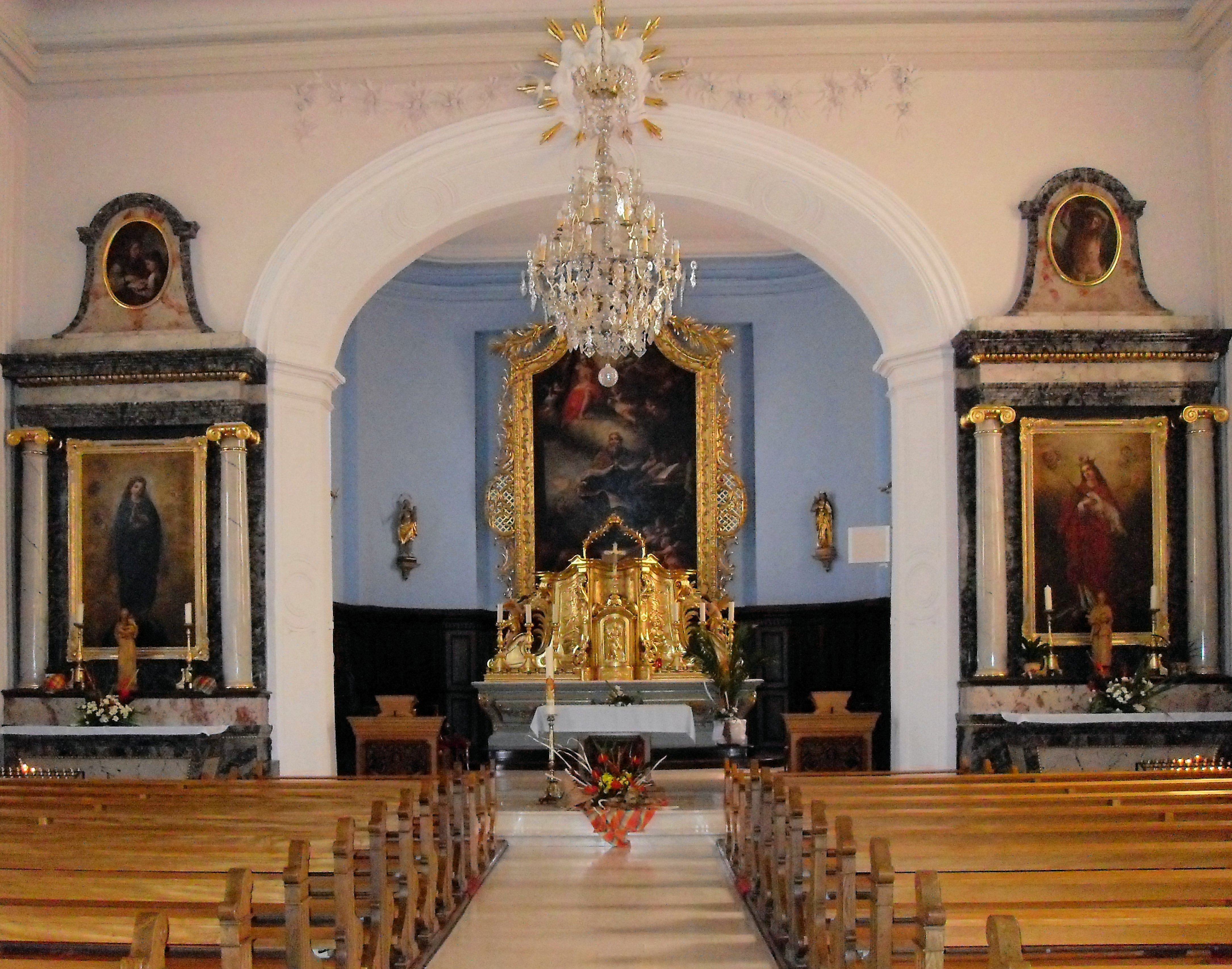 L'intérieur d'église Sainte-Colombe à Fessenheim